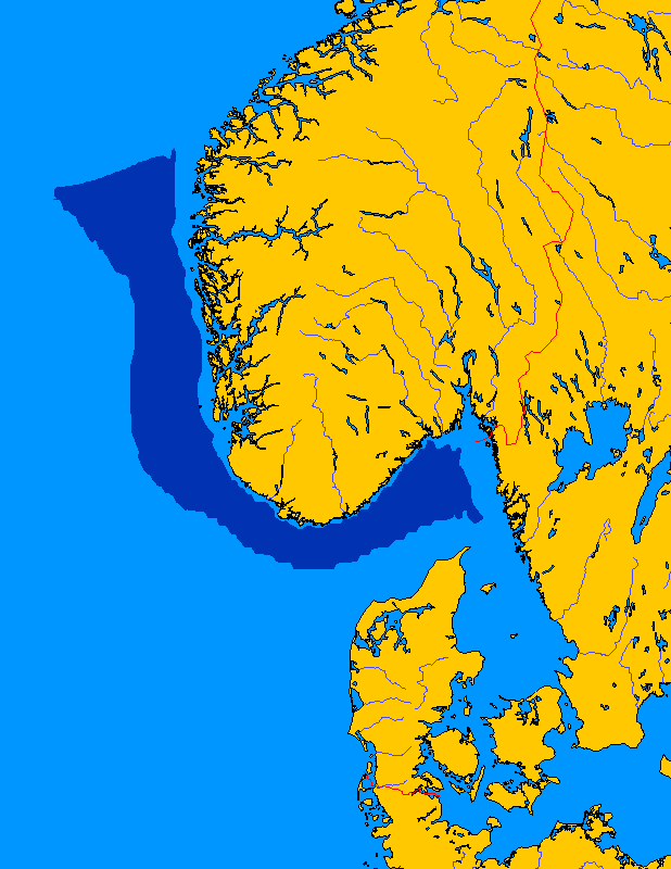 Norskerenna.